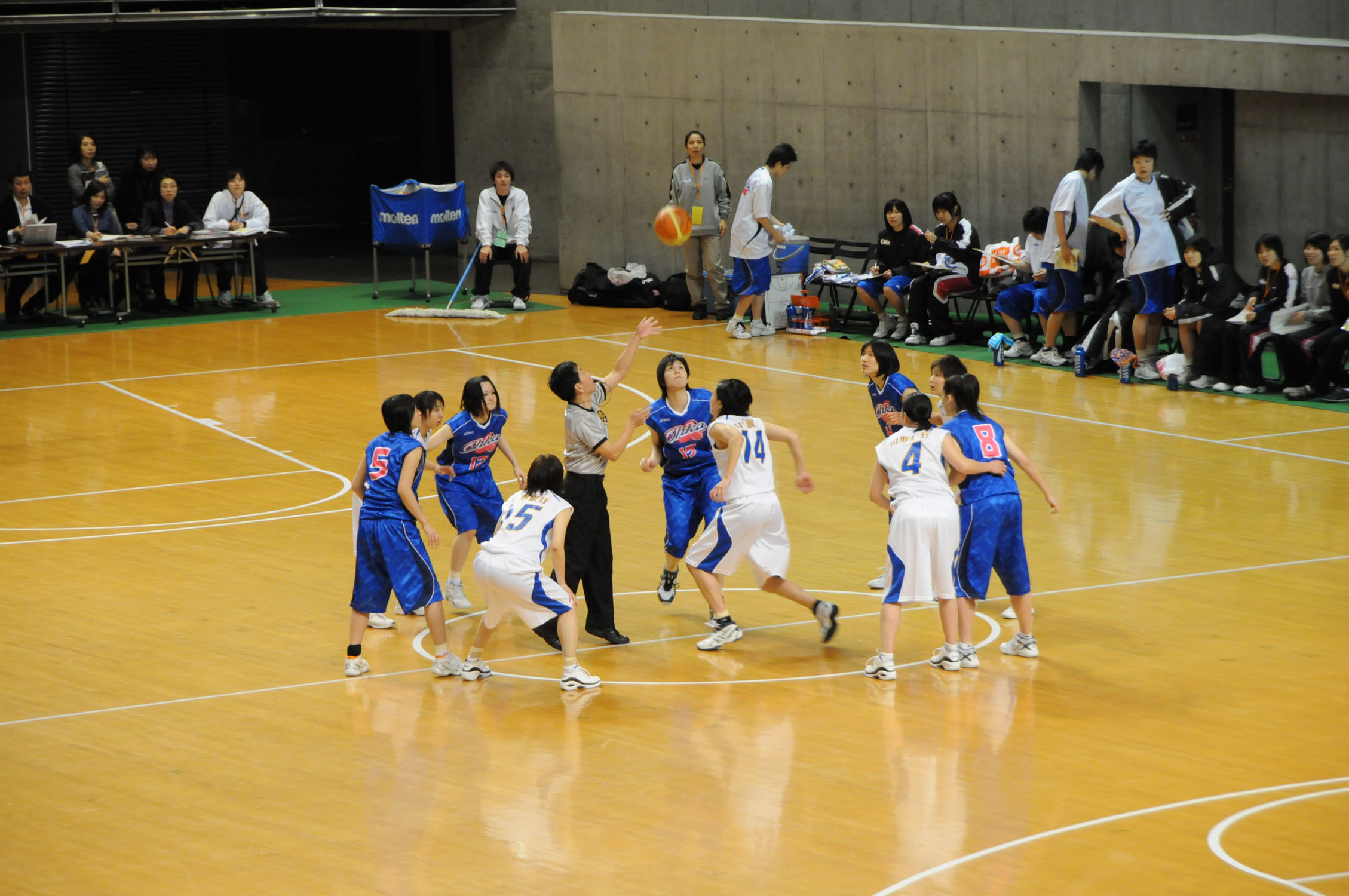 2010年全日本総合バスケットボール選手権大会2回戦、山形銀行ライヤーズ対桜花学園高等学校。東京体育館で。